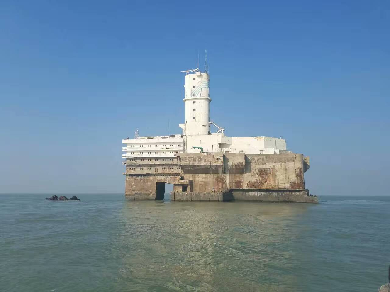 上海市最东端 鸡骨礁